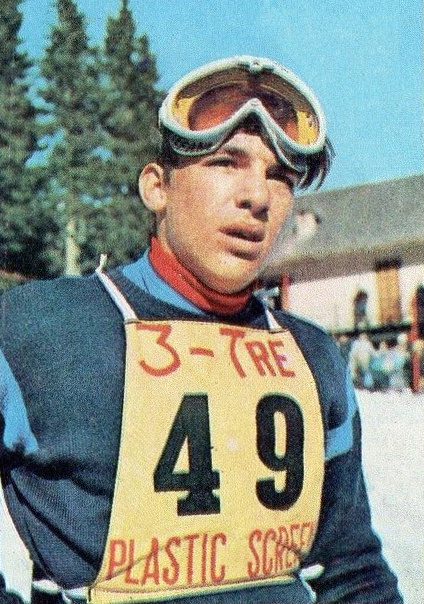 Figurina CAMPIONI dello SPORT 1969/70-n.385- ANZI - ITALIA -SCI-Rec